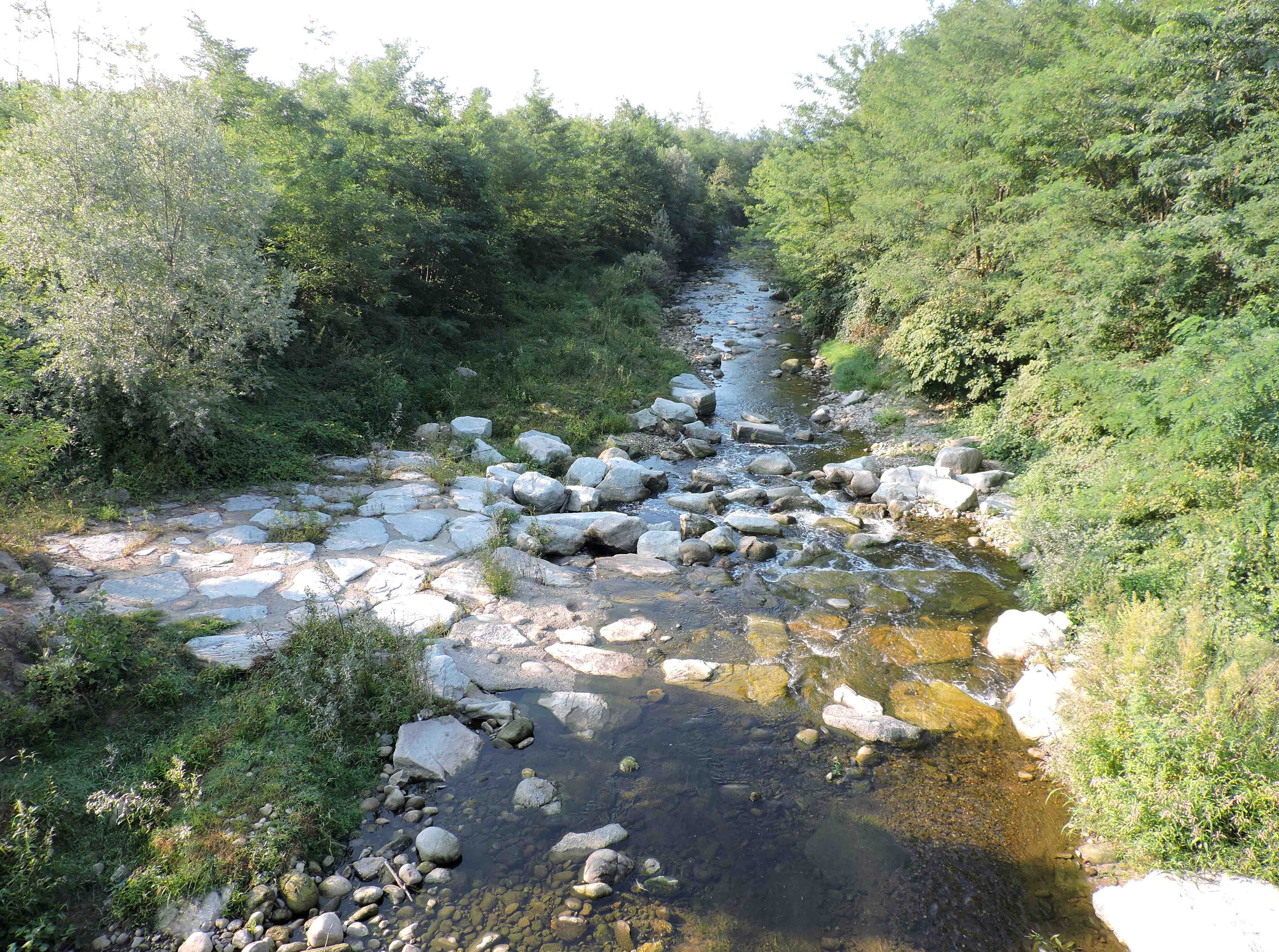 Il torrente Oremo nei pressi di Borriana (BI)